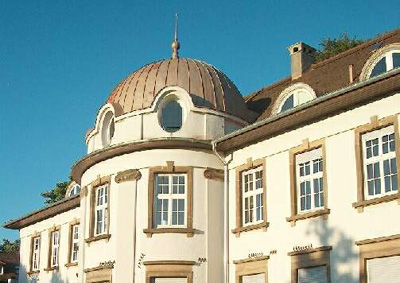 Die Villa Wittmann, in der das französischen Institut von Stuttgart seit seiner Gründung im Jahre 1951 eingerichtet ist.